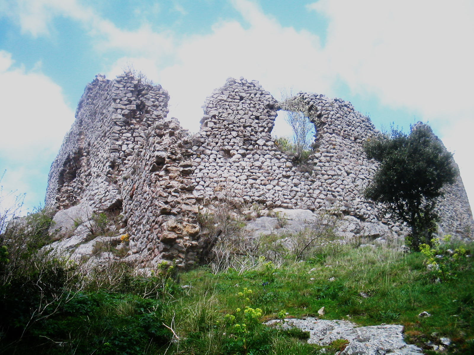 Château d'Auriac (Corbières, Aude )